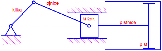 Úplný_klikový_mechanizmus